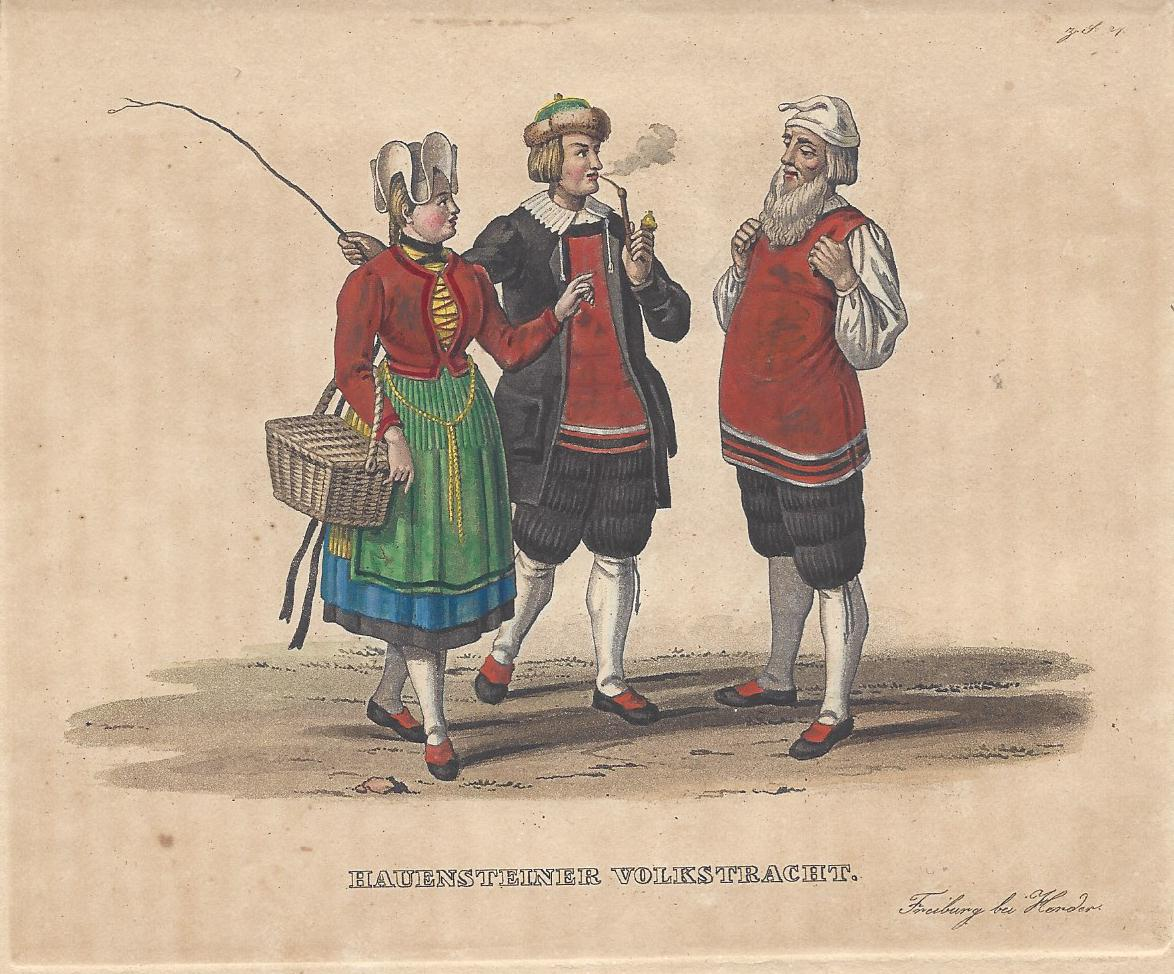 Hauensteiner Volkstracht, aus: Josef Bader Badische Volkssitten und Trachten, Herder Freiburg, 1843